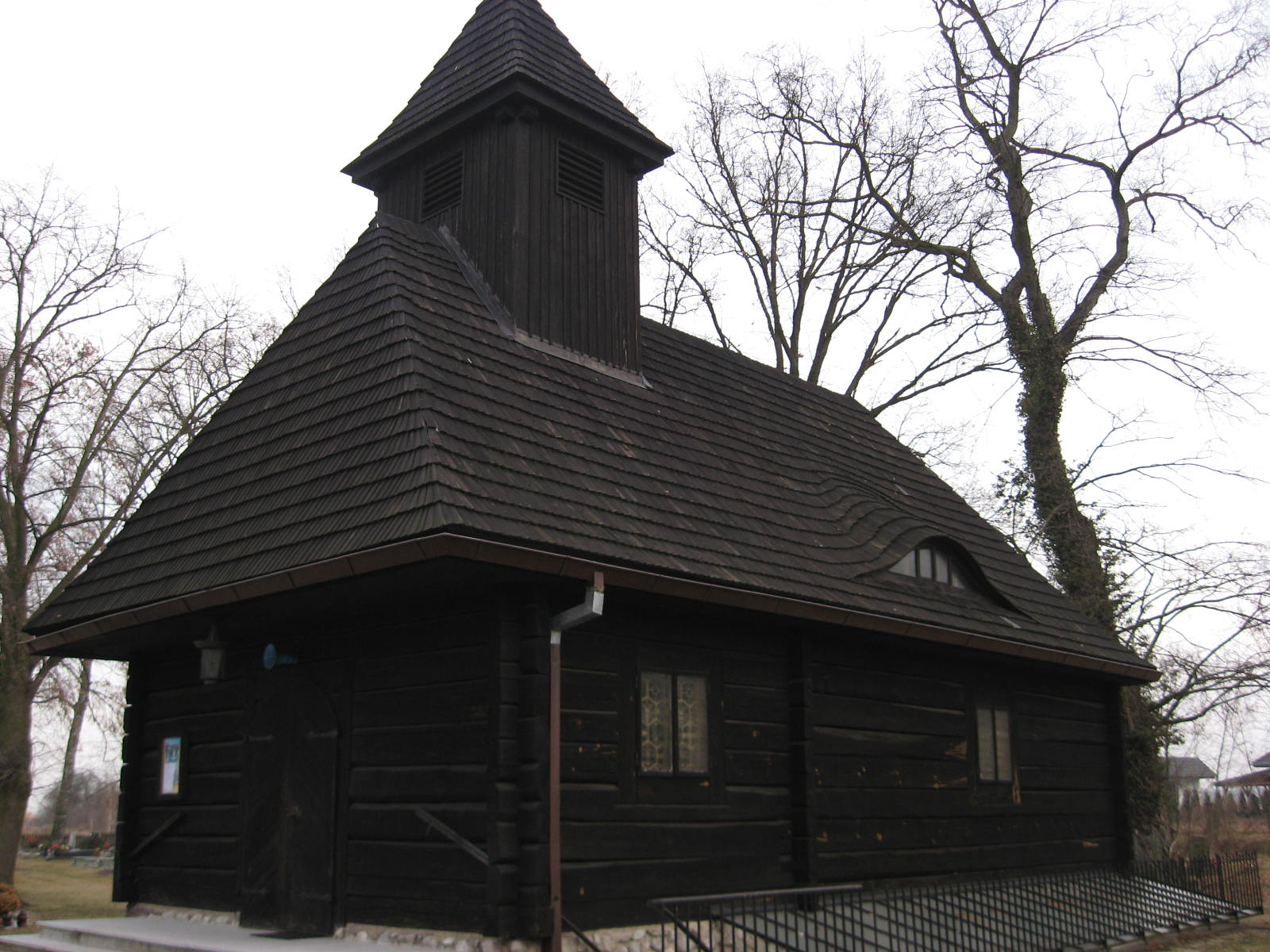 Kościół Podwyższenia Krzyża Świętego w Ligocie Górnej